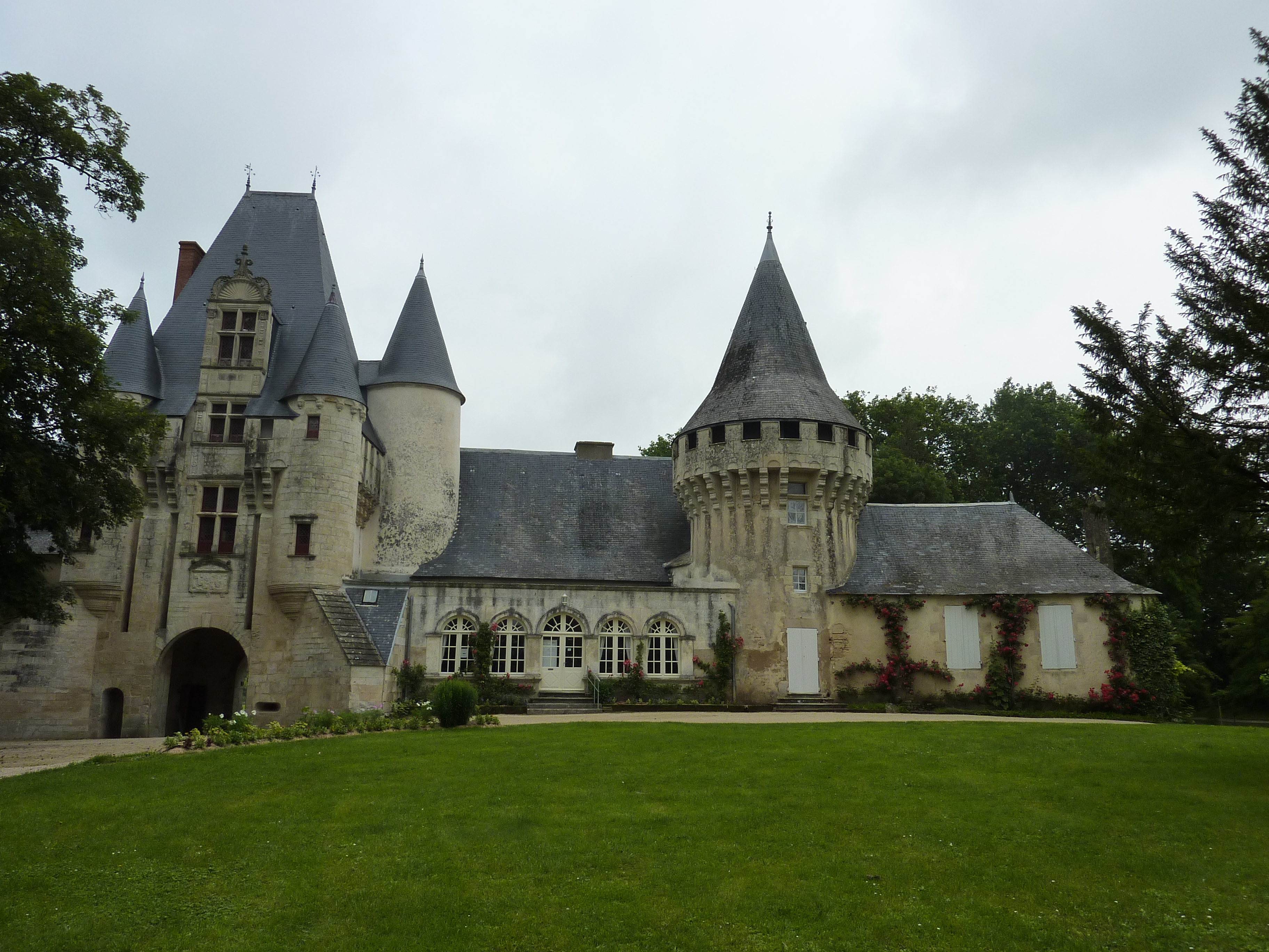 Chef-Boutonne: le château de Javarzay